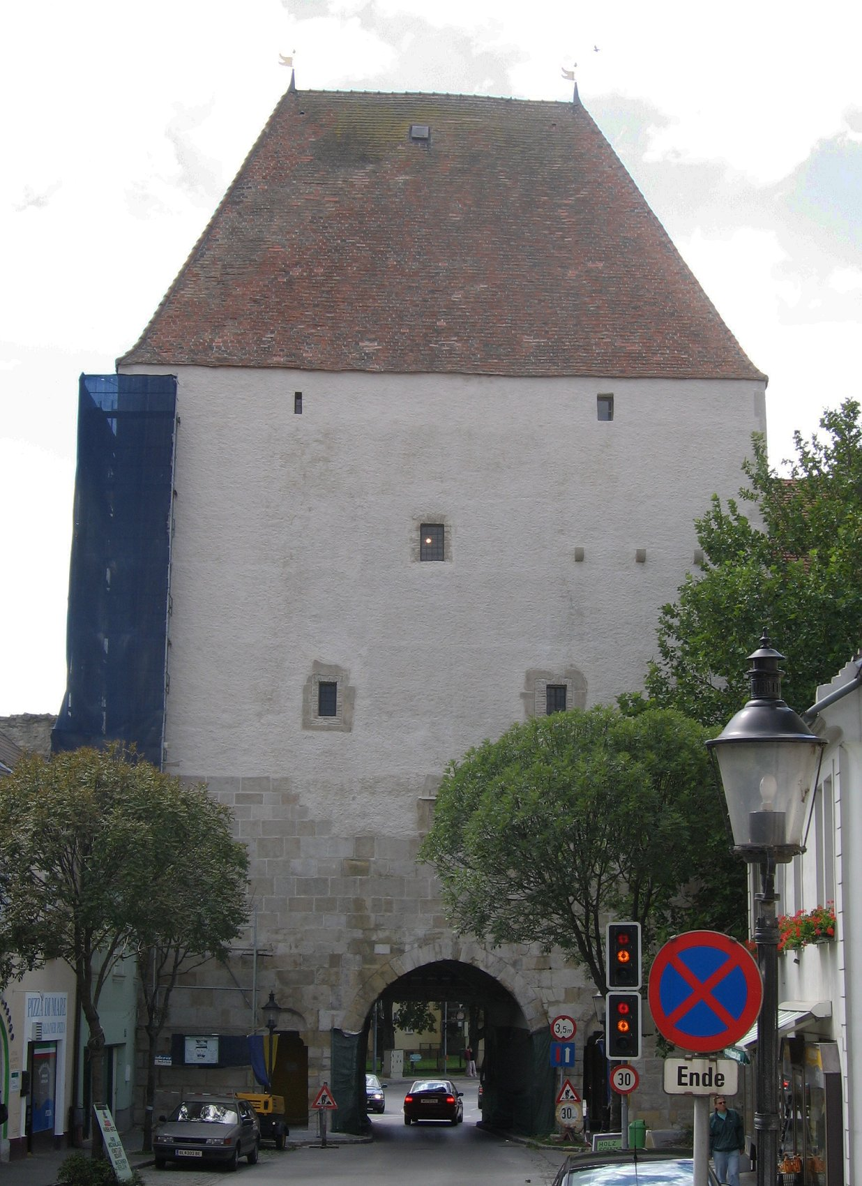 Hainburg, Austria, Wiener Tor (Vienna Gate)